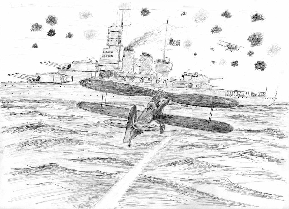 Атака итальянского линкора "Витторио Венето" британскими торпедоносцами "Альбакор" в сражении у Матапана, рисунок